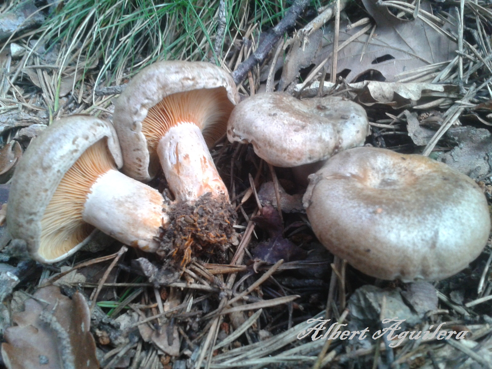 Bolet rovelló fosc